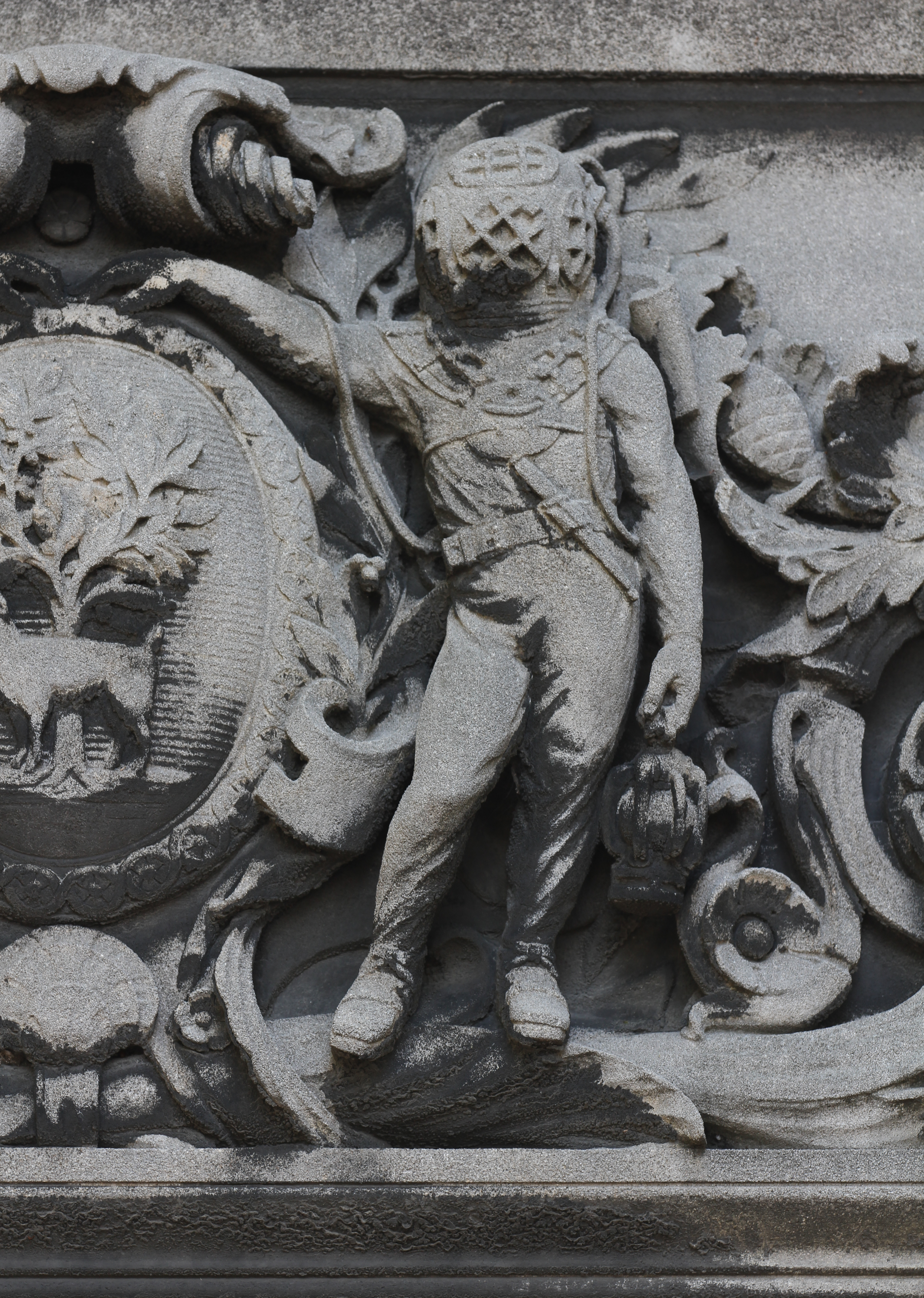 Chapelle avec bustes en reliefs de part et d'autre de la porte et reliefs de scaphandriers en dessus-de-porte. Fronton circulaire à rinceaux peuplés de chérubins.